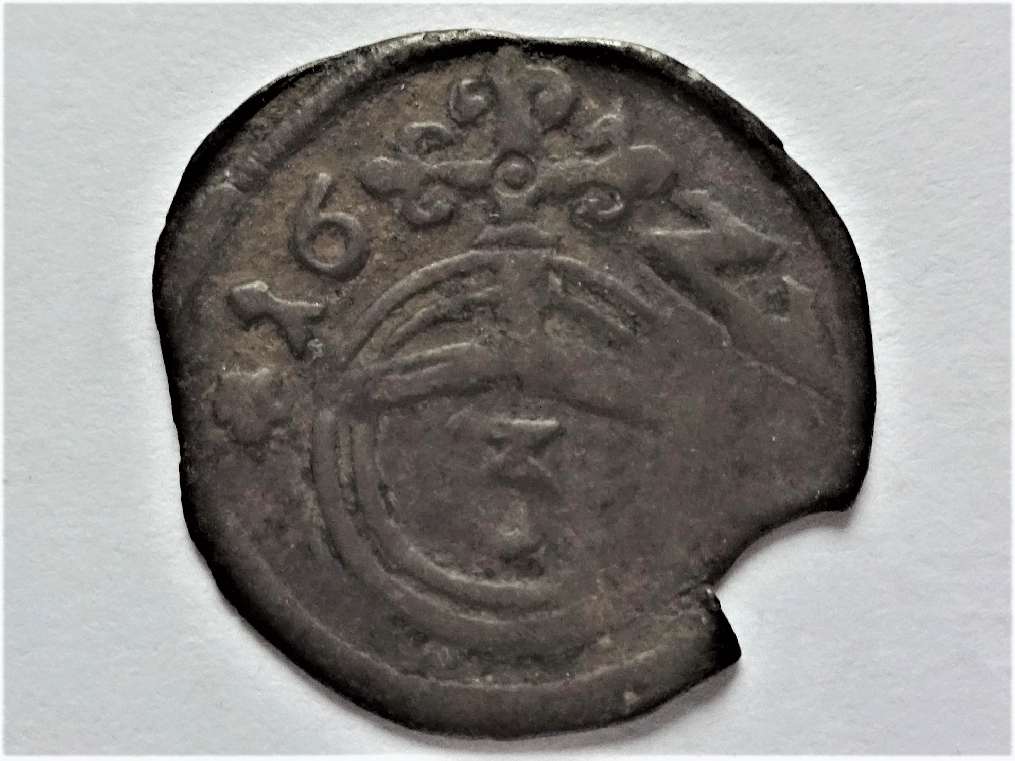 Magdeburger Dreipfennig von 1622, Wertseite